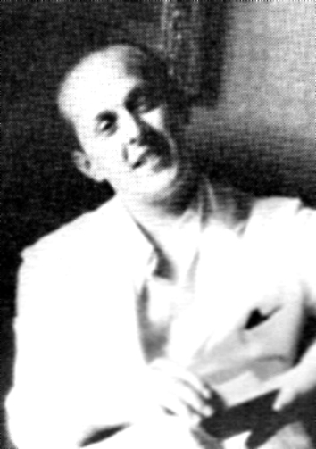 Xavier Abril de Vivero (1905 - 1990) poeta y ensayista peruano.